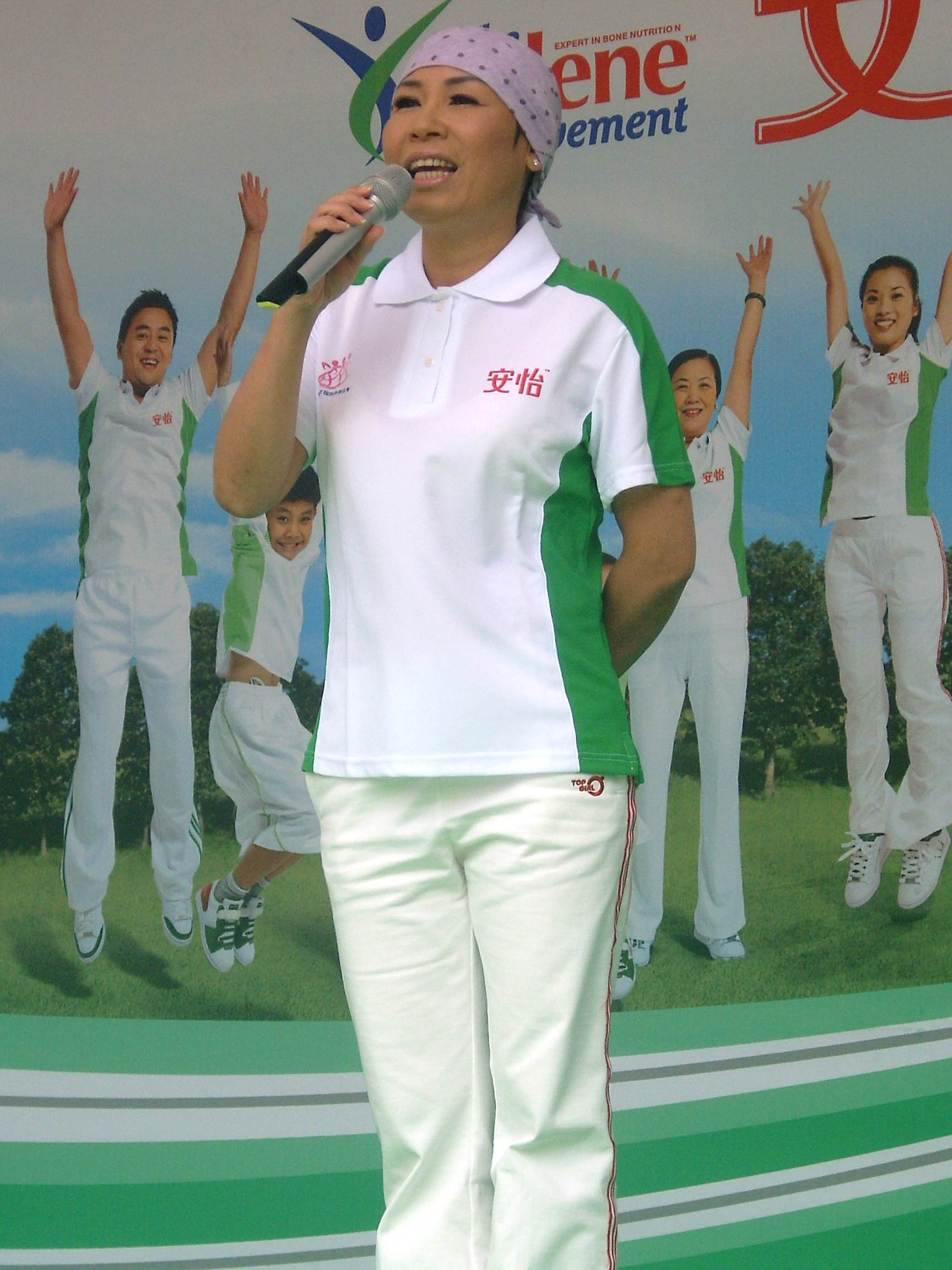 中文（台灣）: 第三屆「安怡超敢動，全民健康動」活動，黃小琥參與演唱。Bân-lâm-gú: tē-3-kài An-î tshiau kám tāng, tsuân-bîn kiān-khong tāng ua̍h-tāng, N̂g Sió-hóo tsham-ú ián-tshiùnn. 第三屆「安怡超敢動，全民健康動」活動，黃小琥參與演唱。